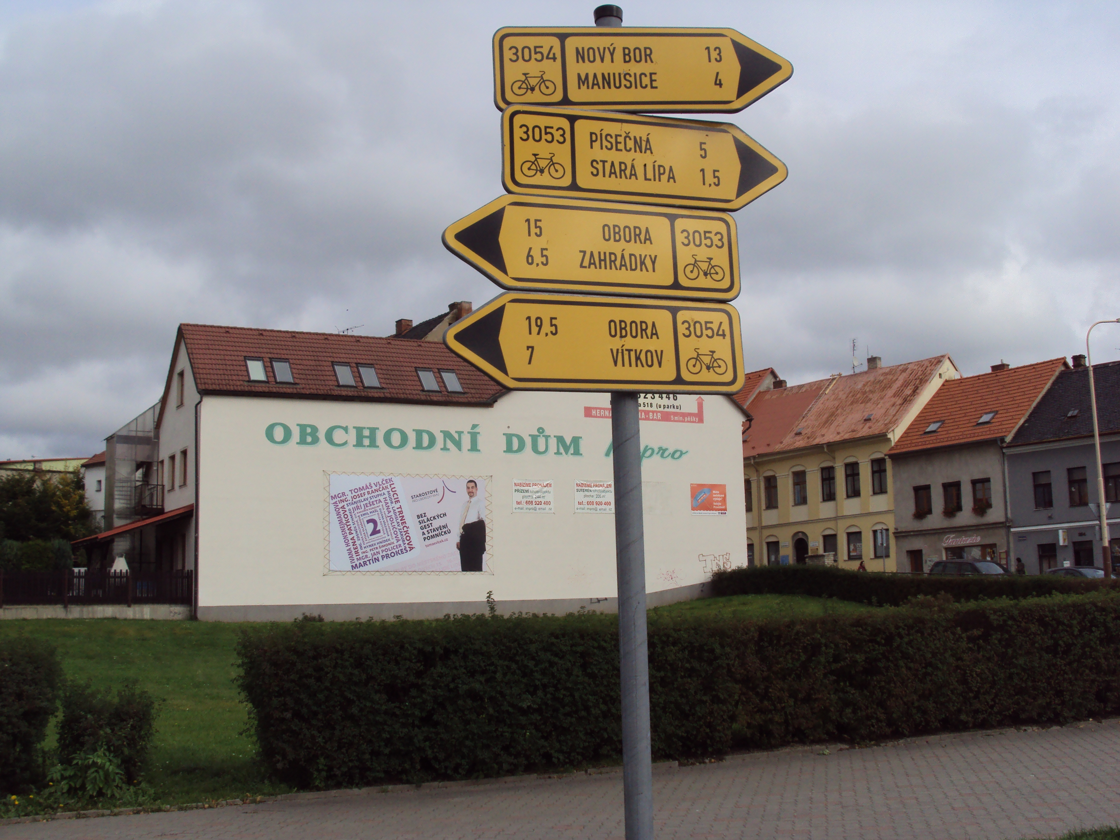 Ukazatele cyklotras v centru České Lípy, před KD Crystal